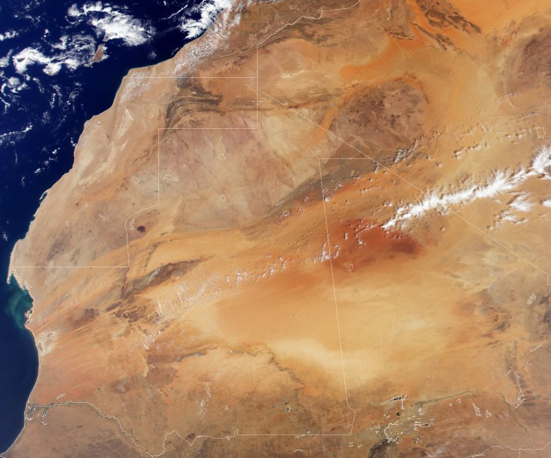 Luftbild Westafrika